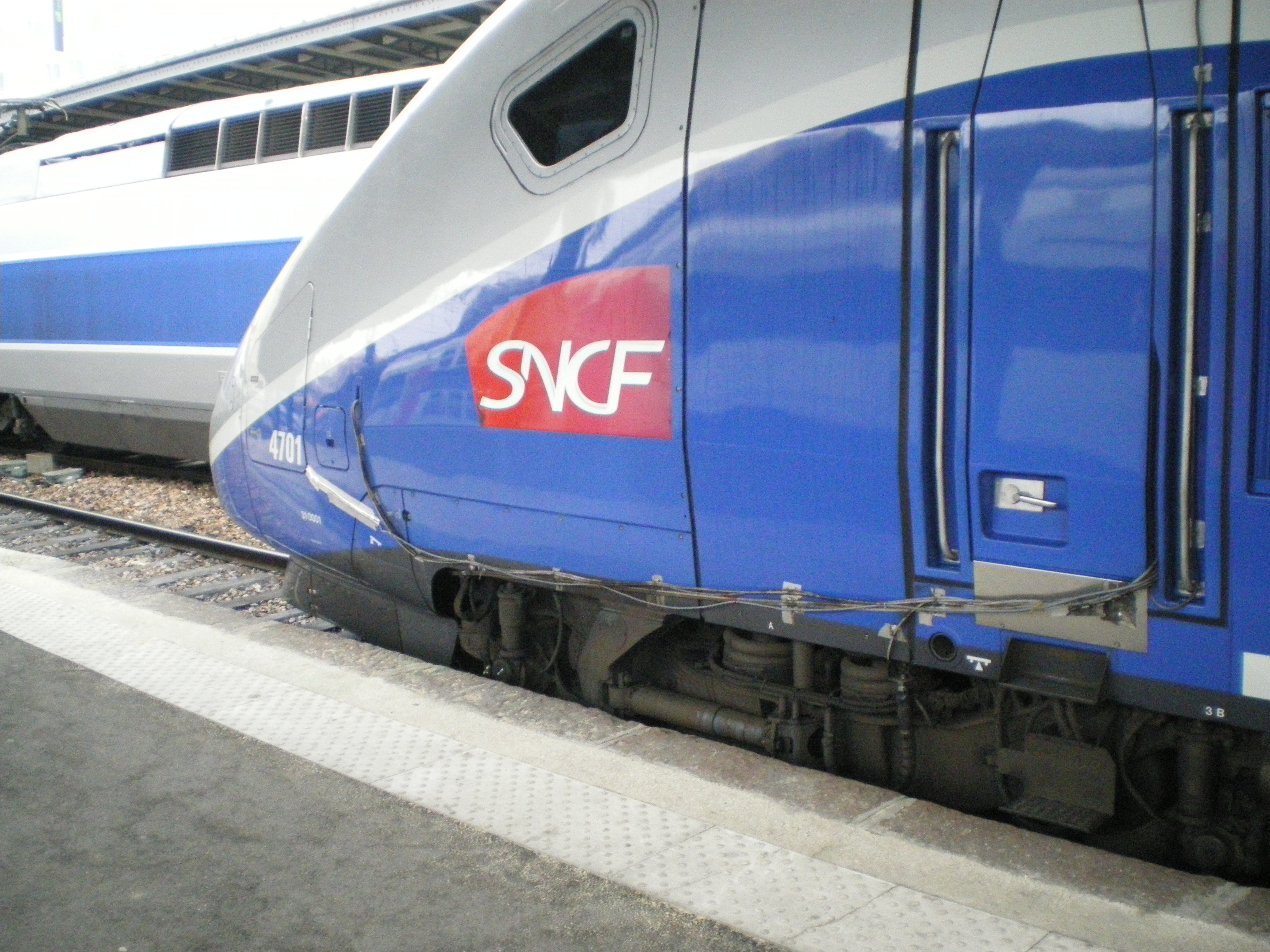 extremite province de la rame